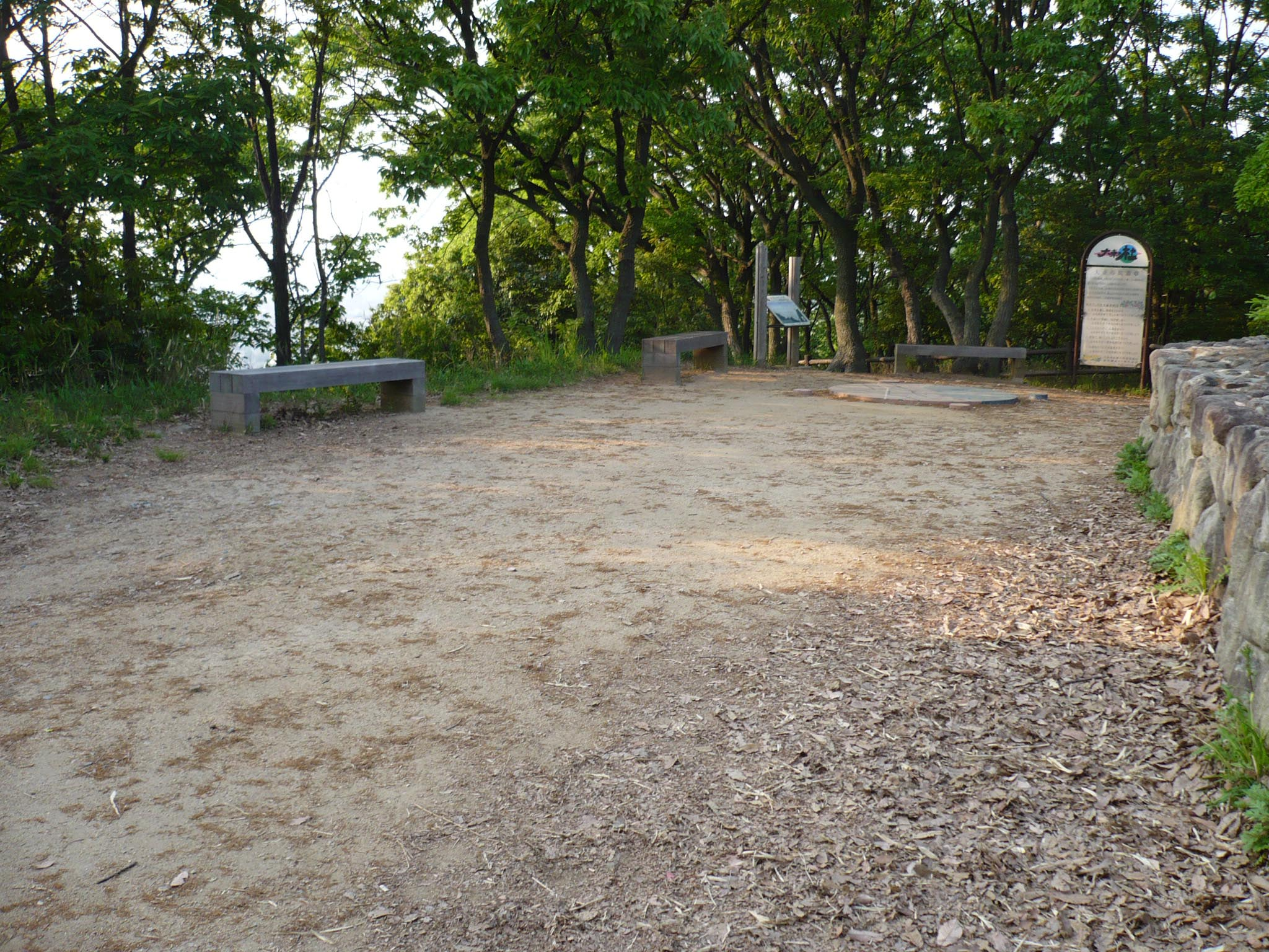 本曲輪跡